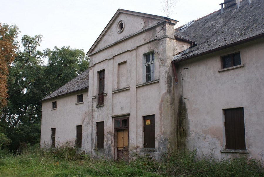 Klony, dwór